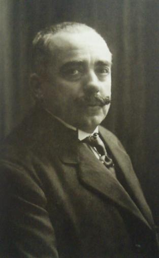 Martí Pujol i Planas (1859-1926) hisendat i polític. Alcalde de Badalona entre 1906-10 i 1912-1914.